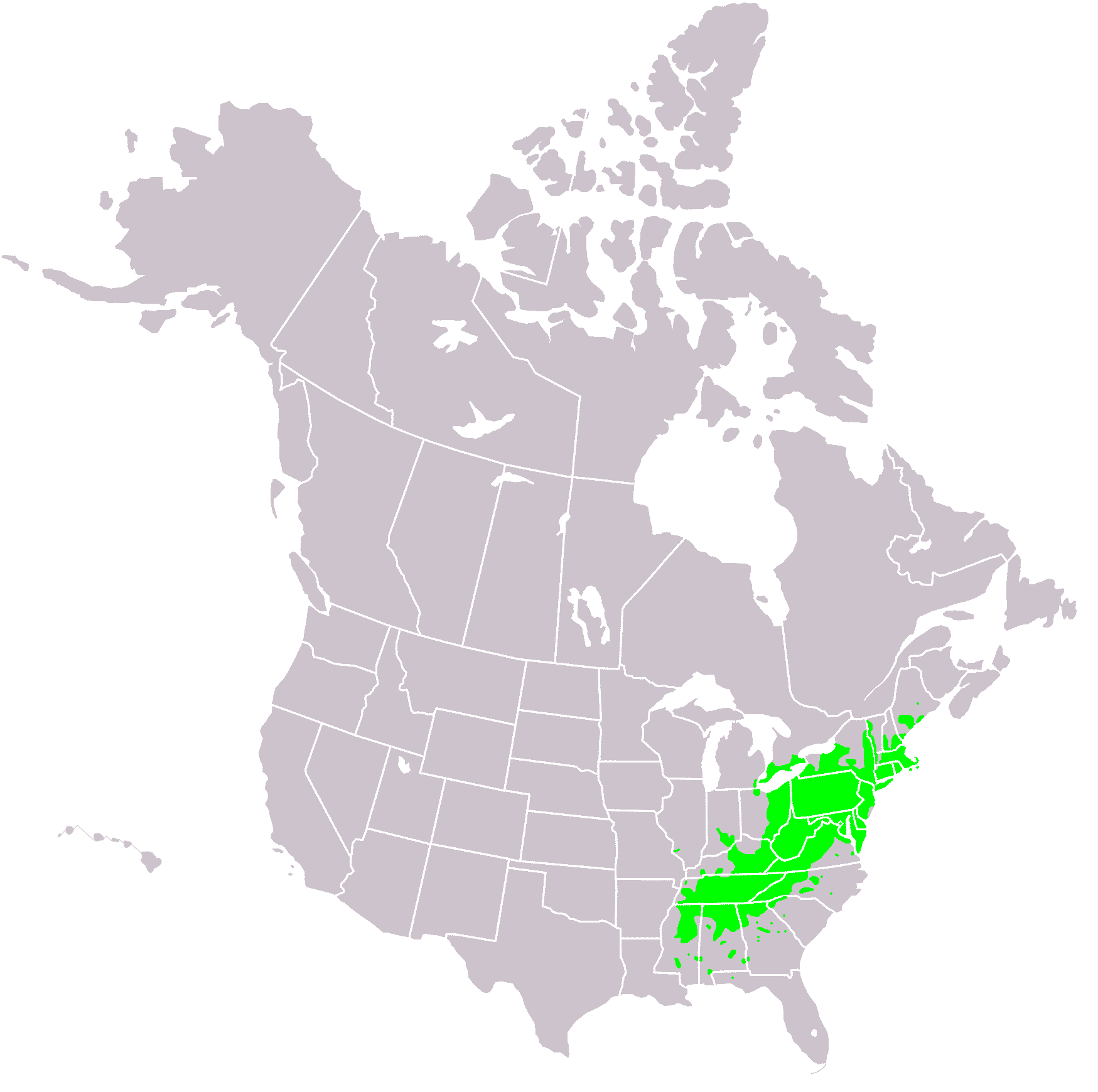 Range map for Castanea dentata